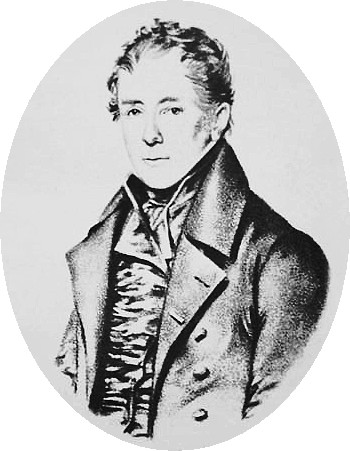 Carl Fredrik König